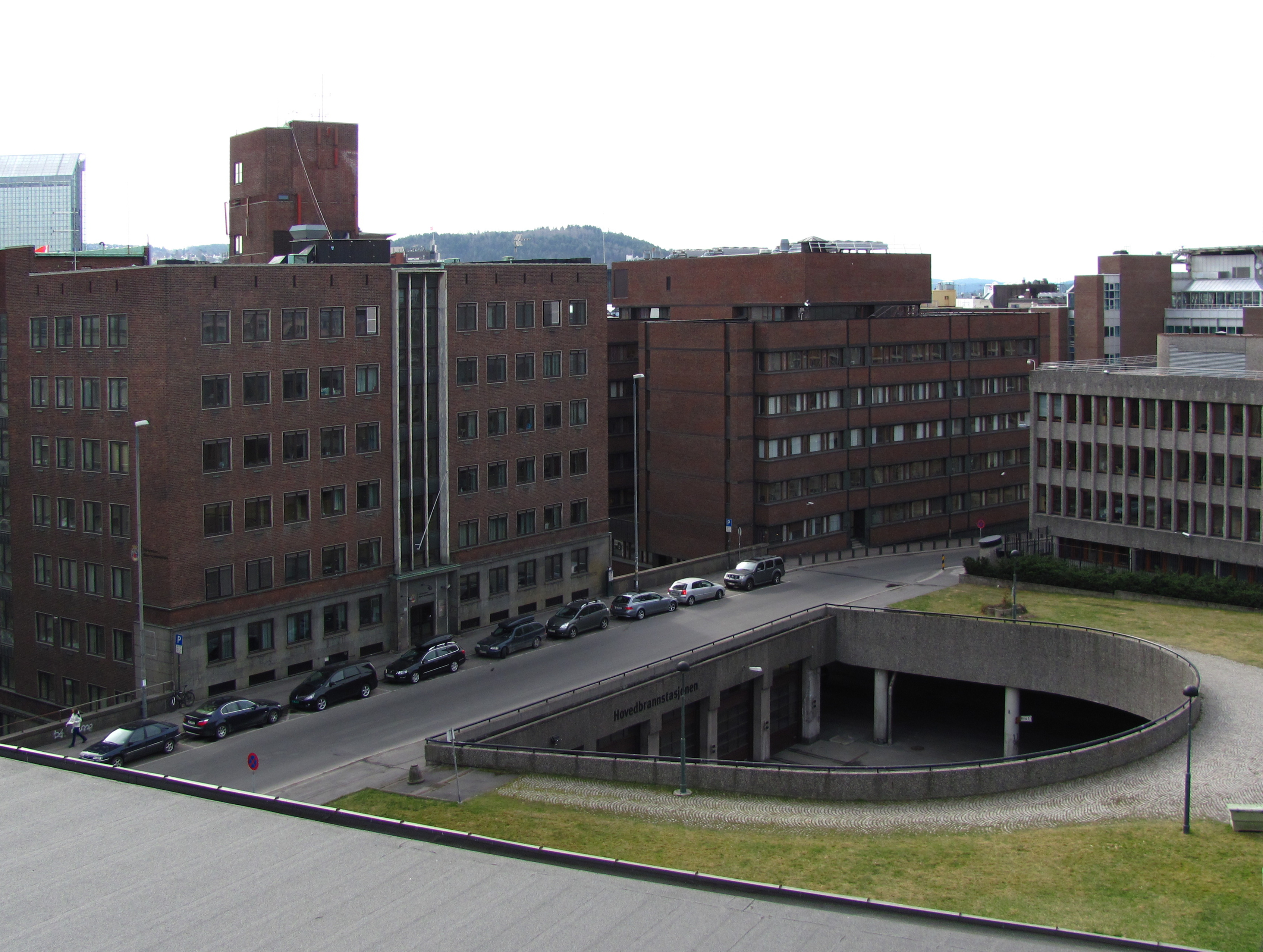 Arne Garborgs plass og Hovedbrannstasjonen i Oslo sett fra Deichmanske bibliotek